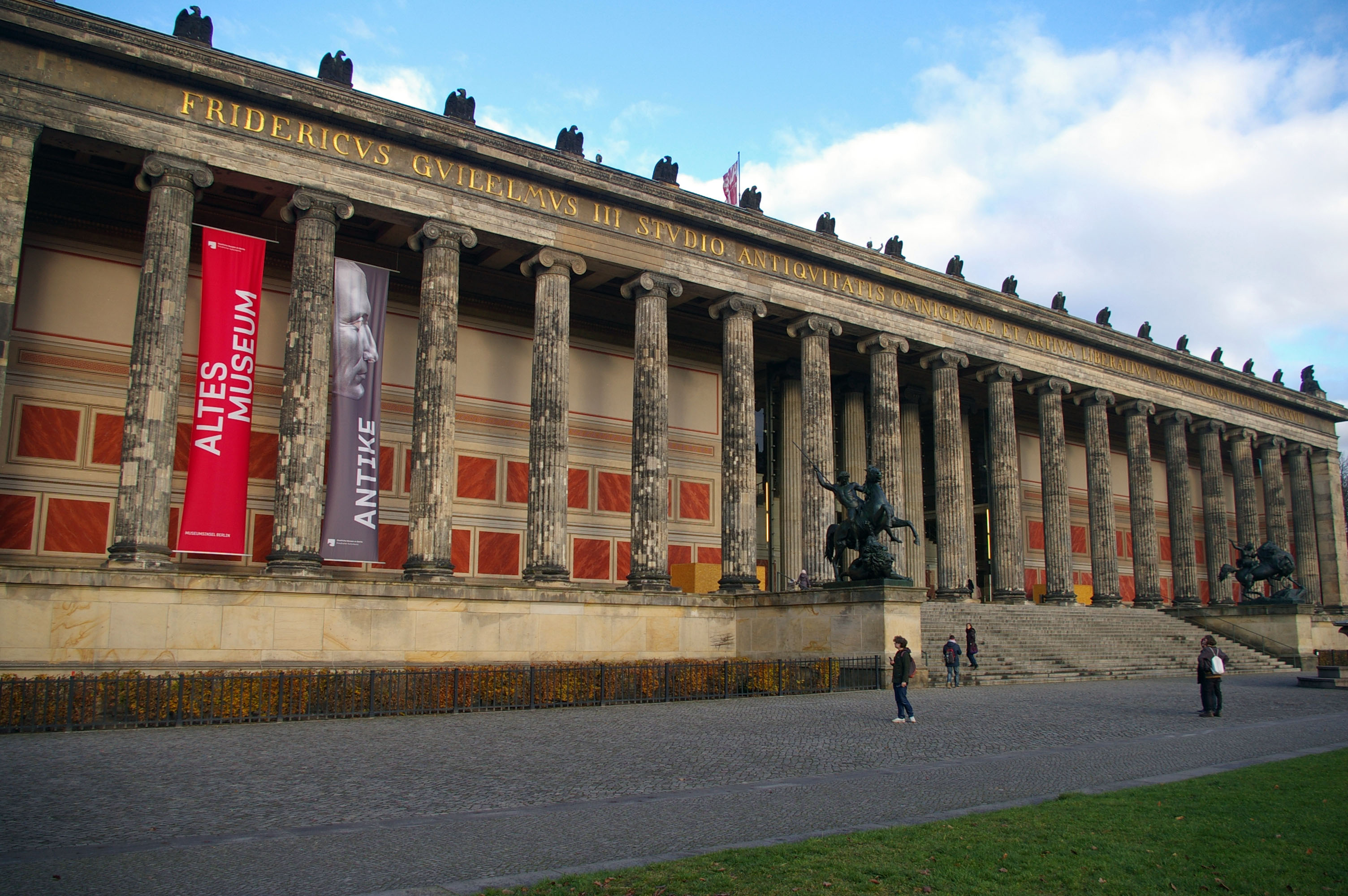 Staré muzeum Berlín